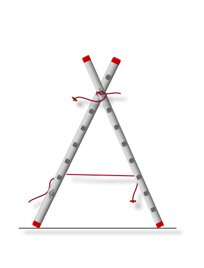 Aufbau einer Bockleiter